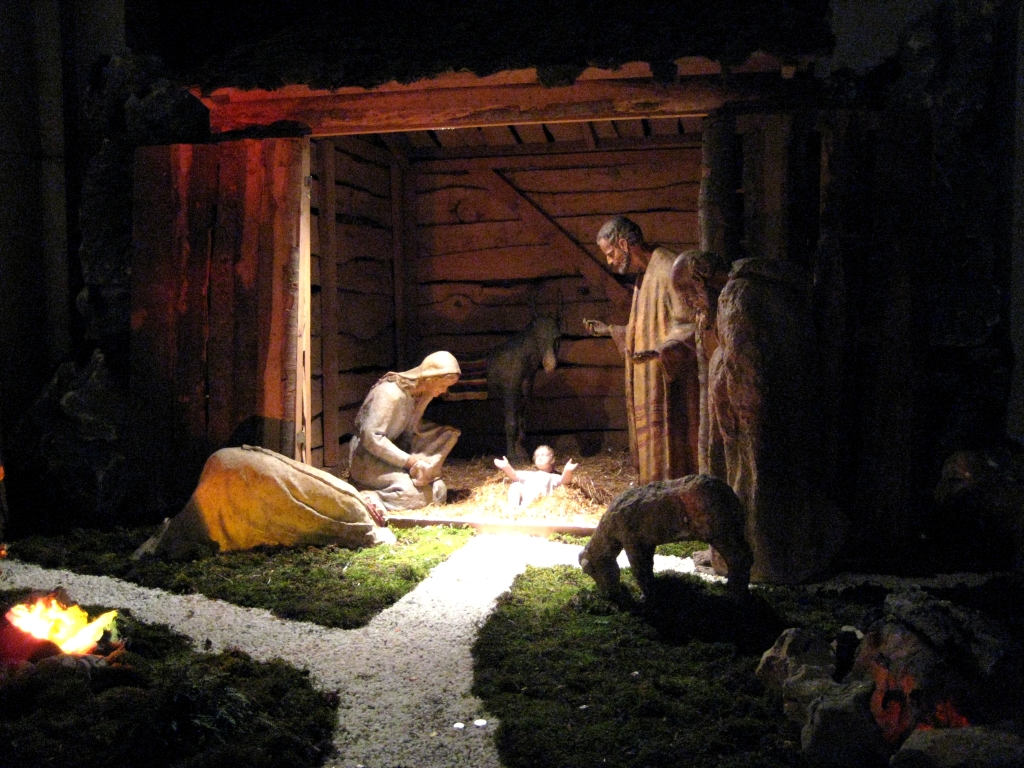 Jaslice u crkvi Gospe Lurdske u Rijeci